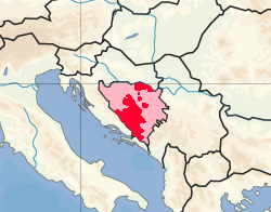 Республика Герцег-Босна